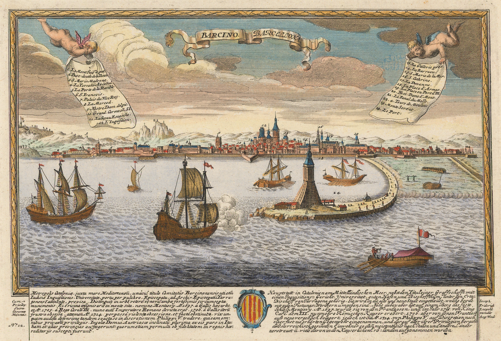 Barcino. Barcelona, por Joseph Friderich Leopold